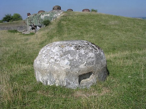 Fausse cloche en béton à coté d'un ouvrage